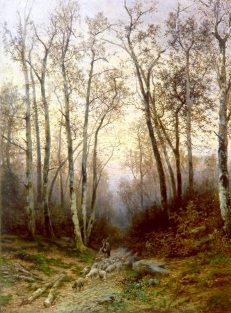 Návrat z pastvy, Východočeská galerie Pardubuce